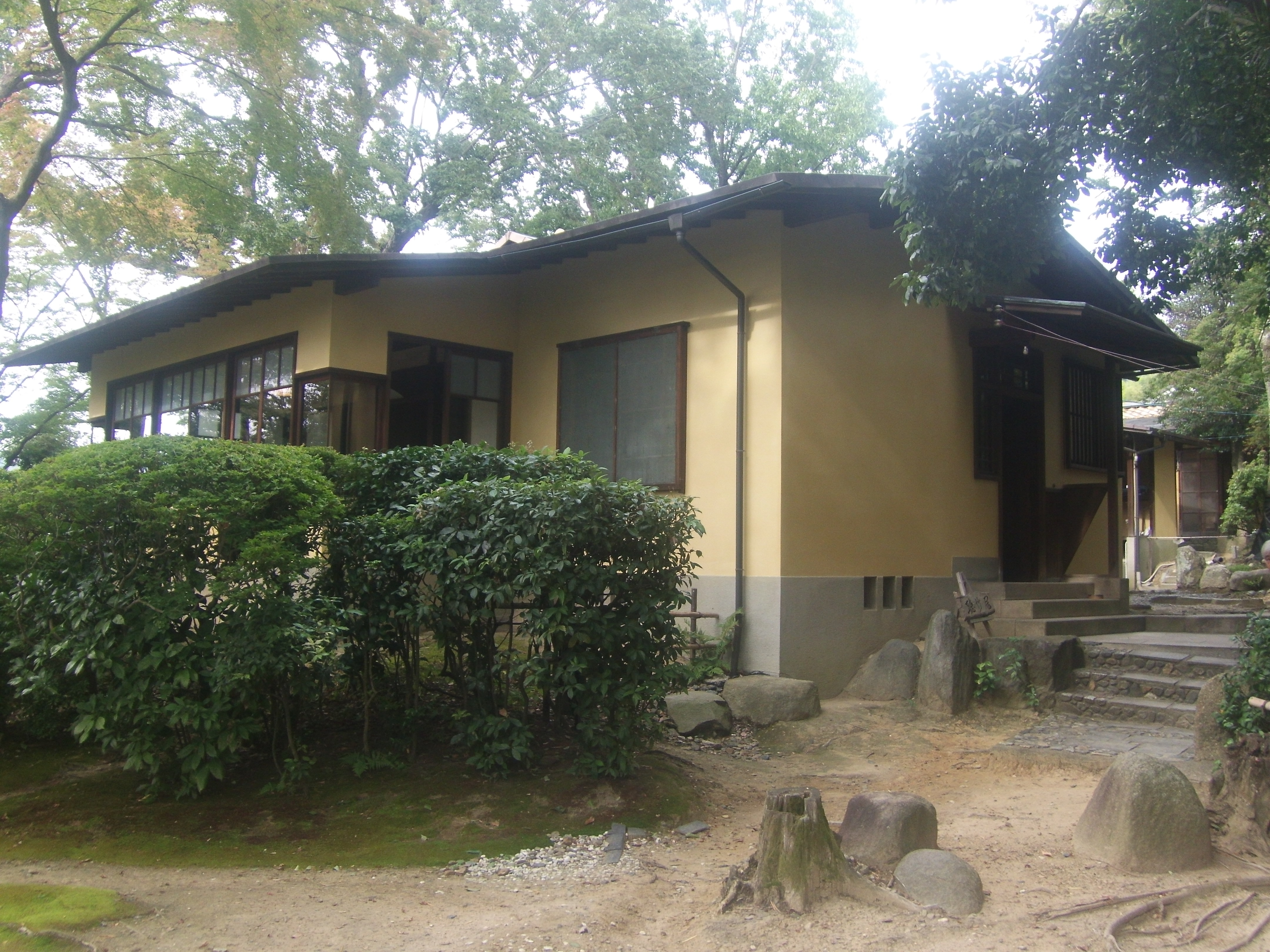 藤井厚二による設計で、環境共生住宅を先駆けた聴竹居（京都府大山崎町）